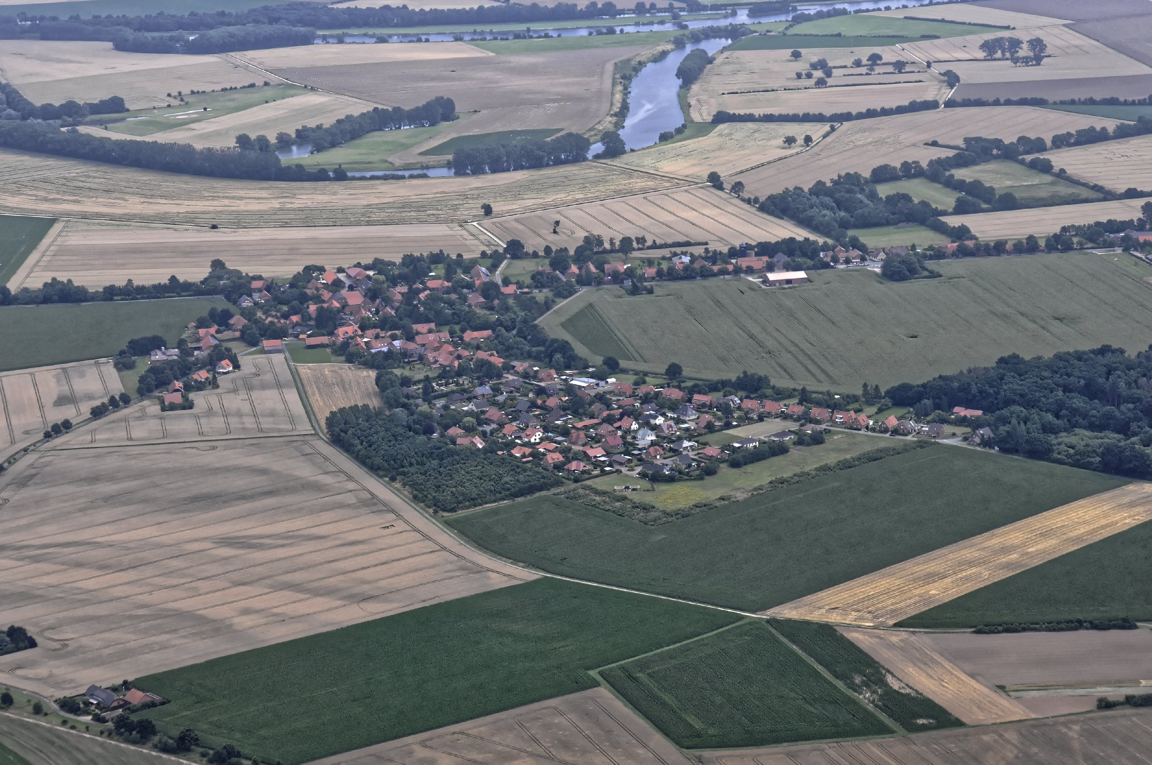 Bilder vom Flug Nordholz-Hammelburg 2015: Wellie und die Wellier Schleife der Weser.